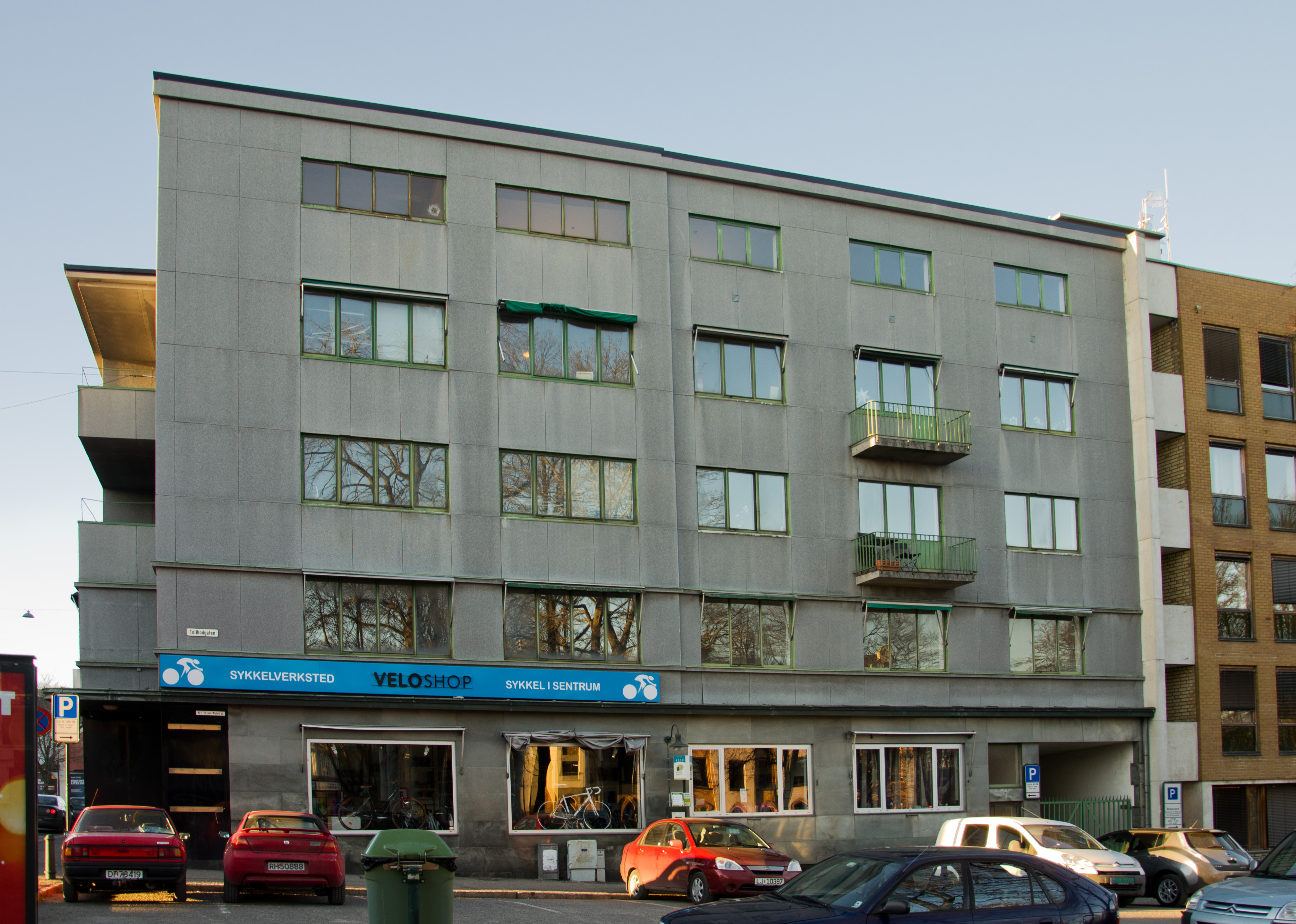 Egenesgården, Grev Wedels gate 1, Tønsberg